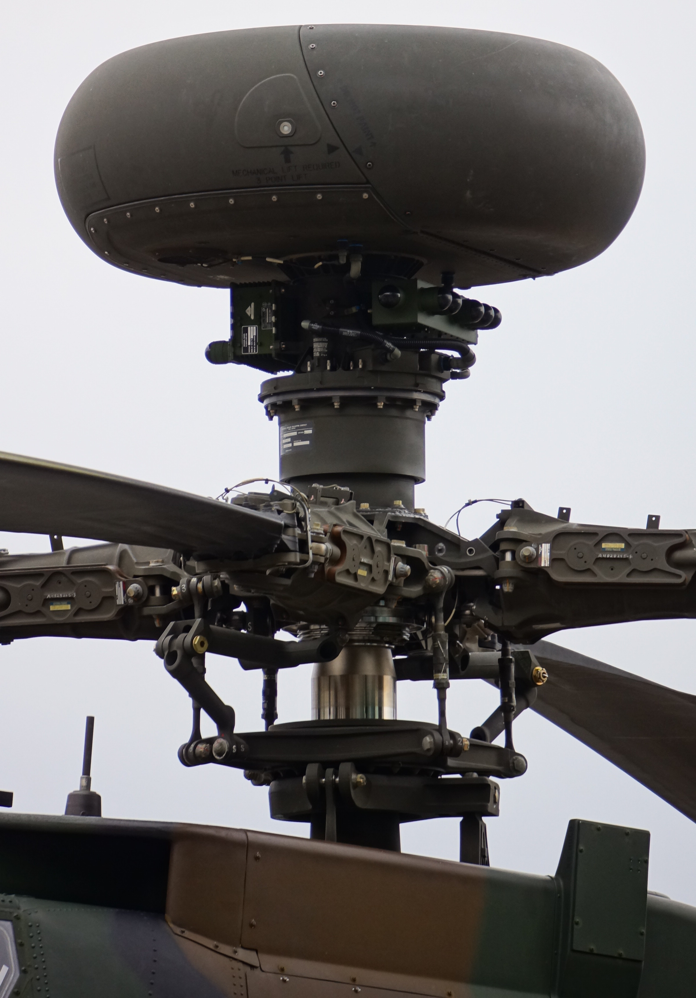 陸上自衛隊 AH-64D AN/APG-78ロングボウ・レーダー。2013年3月10日 大阪ATCにて。